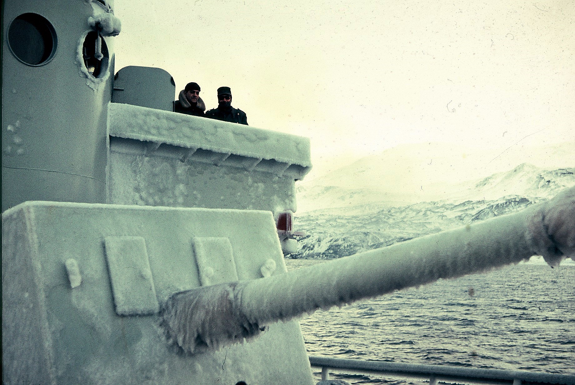 En marzo de 1958 nos enviaron desde Punta Arenas a rescatar al personal de la base antártica chilena Luis Risopatrón que se incendió al mes de ser inaugurada. Pertenecía al Instituto Antártico Chileno y estaba dotada de científicos de las universidades.En la navegación del estrecho de Gerlache tuvimos un temporal de viento y nieve. A bordo del PP 60 Lientur de la Armada de Chile.